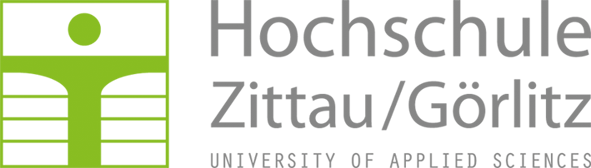 Logo Hochschule Zittau/Görlitz